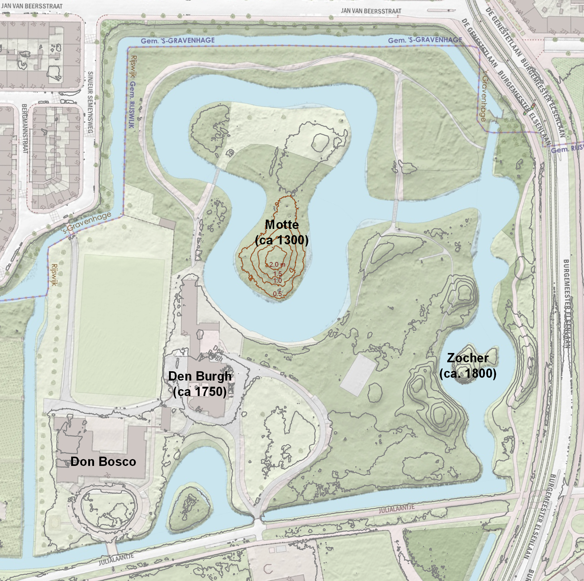 De motte op landgoed Den Burch in Rijswijk ZH This map may be incomplete, and may contain errors. Don't rely solely on it for navigation.